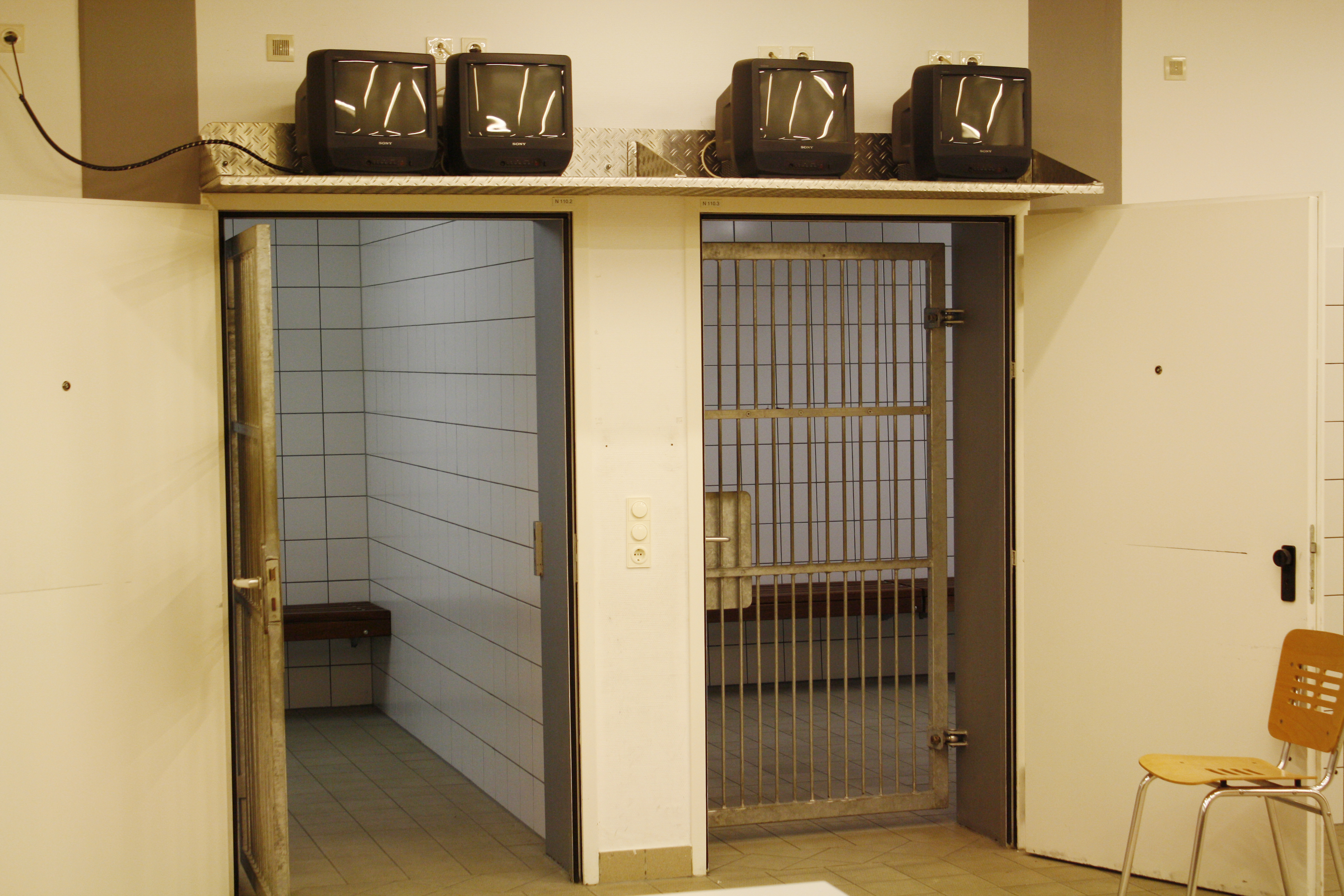 Gefangenensammelstelle im Signal-Iduna-Park in Dortmund.